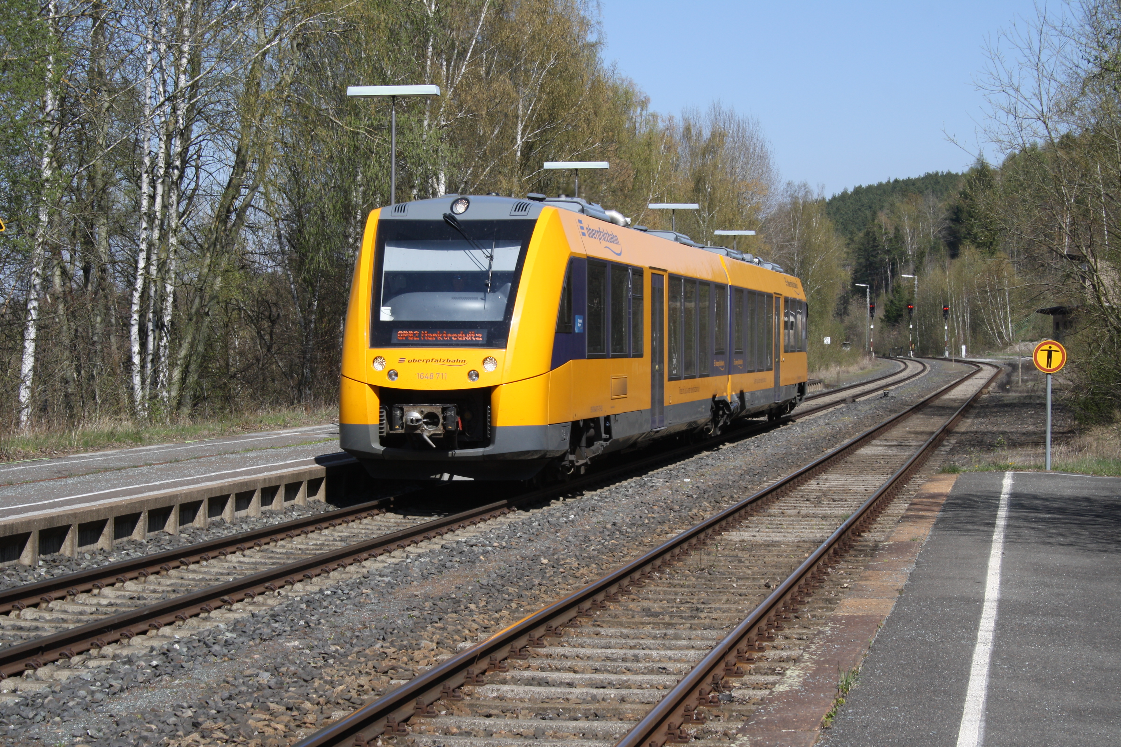 Dieseltriebzug der Oberpfalzbahn im Bahnhof Arzberg